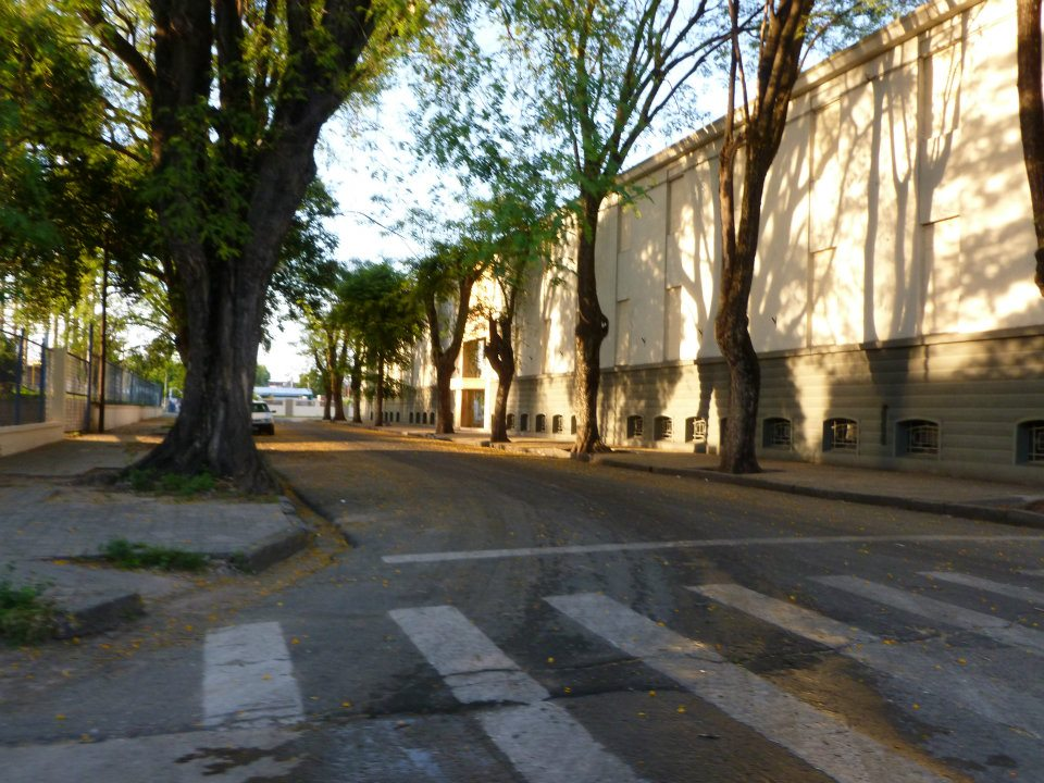 Imagen de la fachada del colegio por Pasaje Hermanos de La Salle